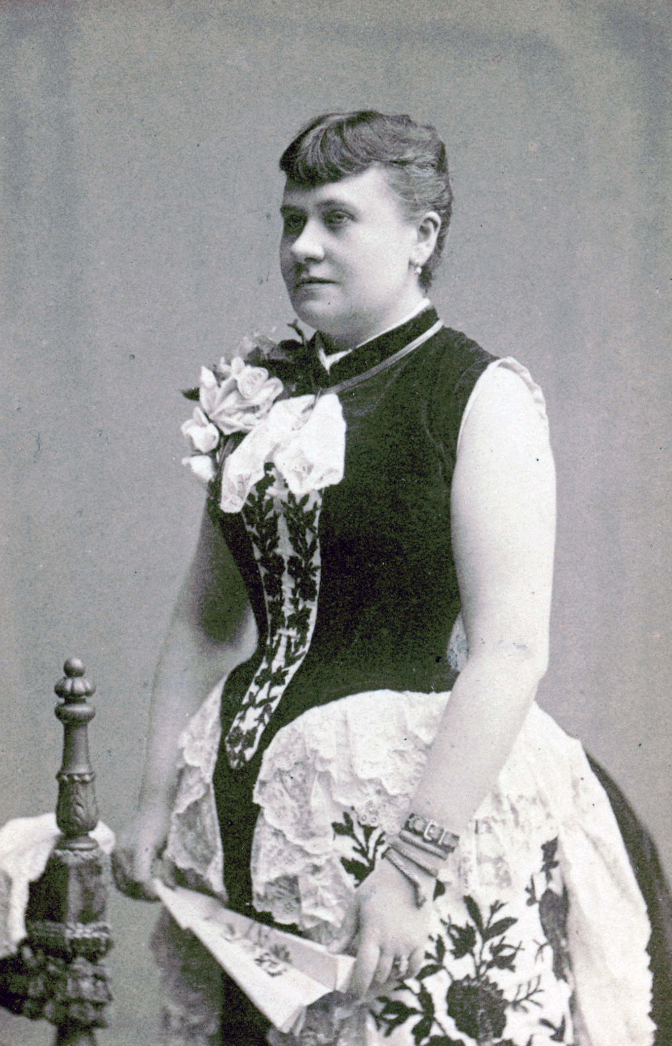 Caroline Östberg, sångare vid Kungliga Operan 1891